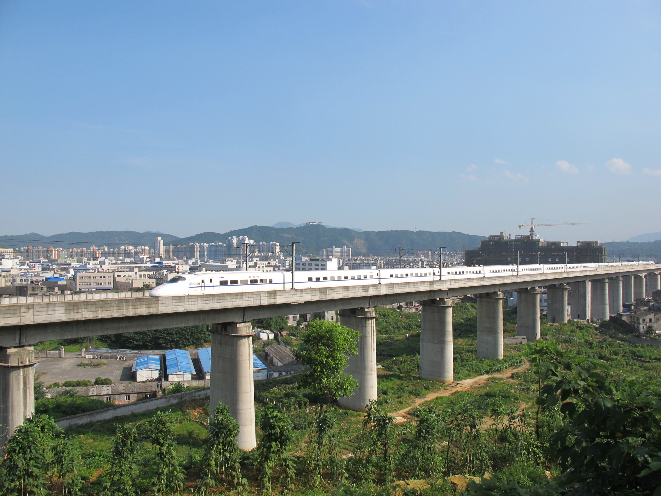 动车呼啸而来